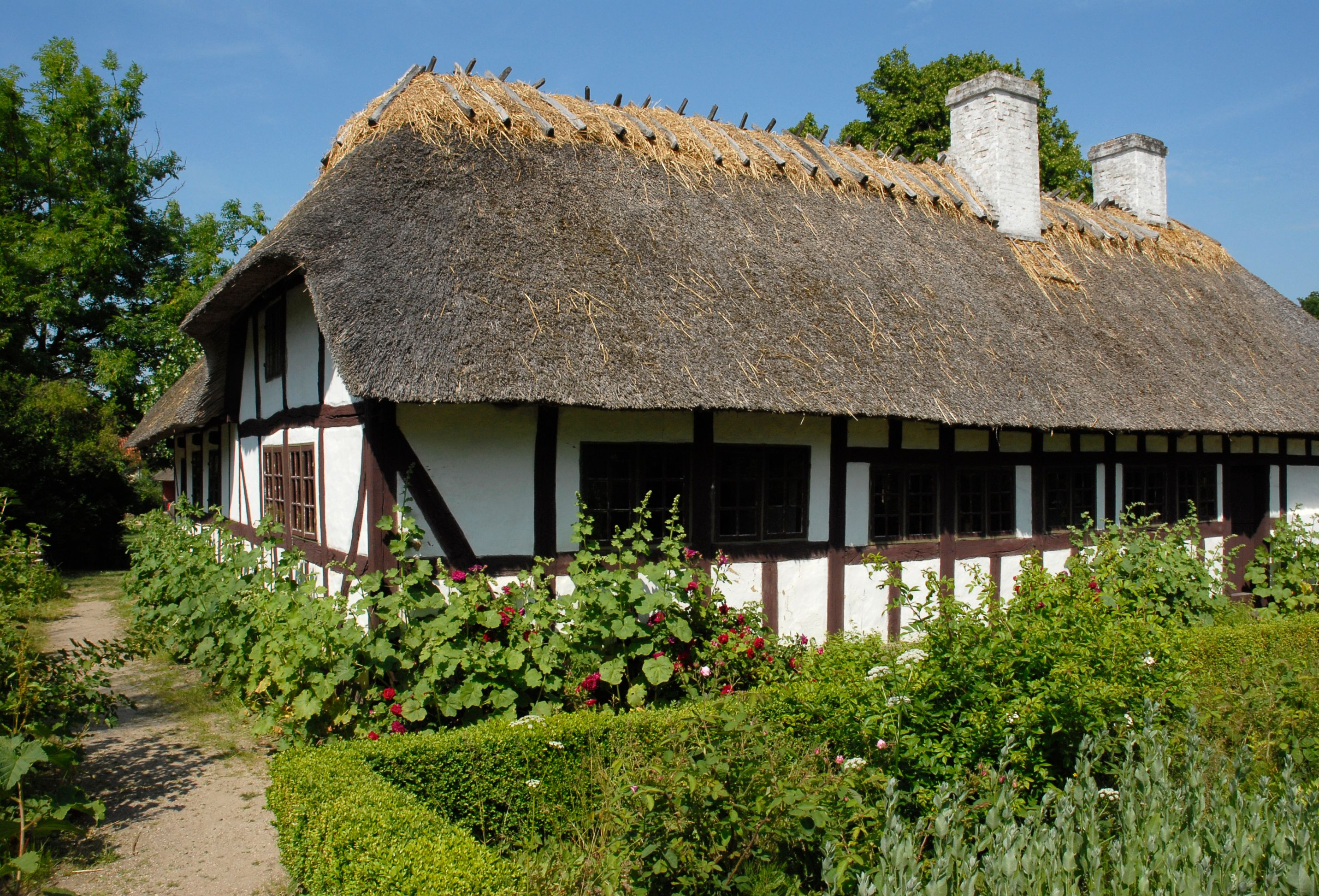 Åruphuset set fra havesiden. Stokroser langs muren, bedene hegnet af buksbom.